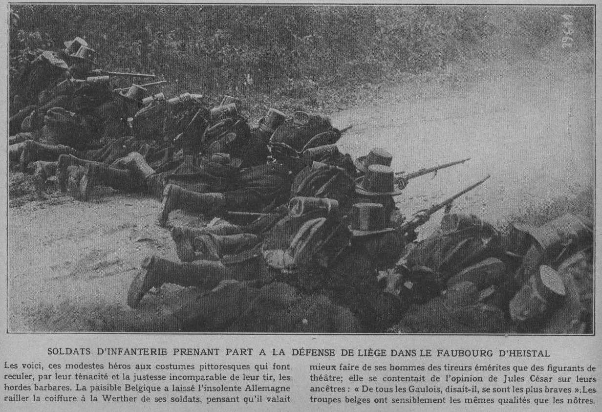 «La Belgique envahie à gardé son sang-froid». Les forces belges à Liège.